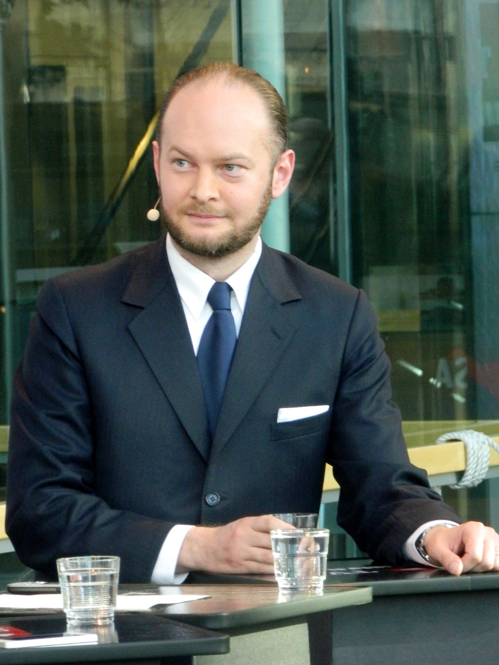 Perussuomalaisten europarlaamentaarikko Sampo Terho Ilta-Sanomien eurovaaliväittelyssä Sanomatalossa 15.5.2014.